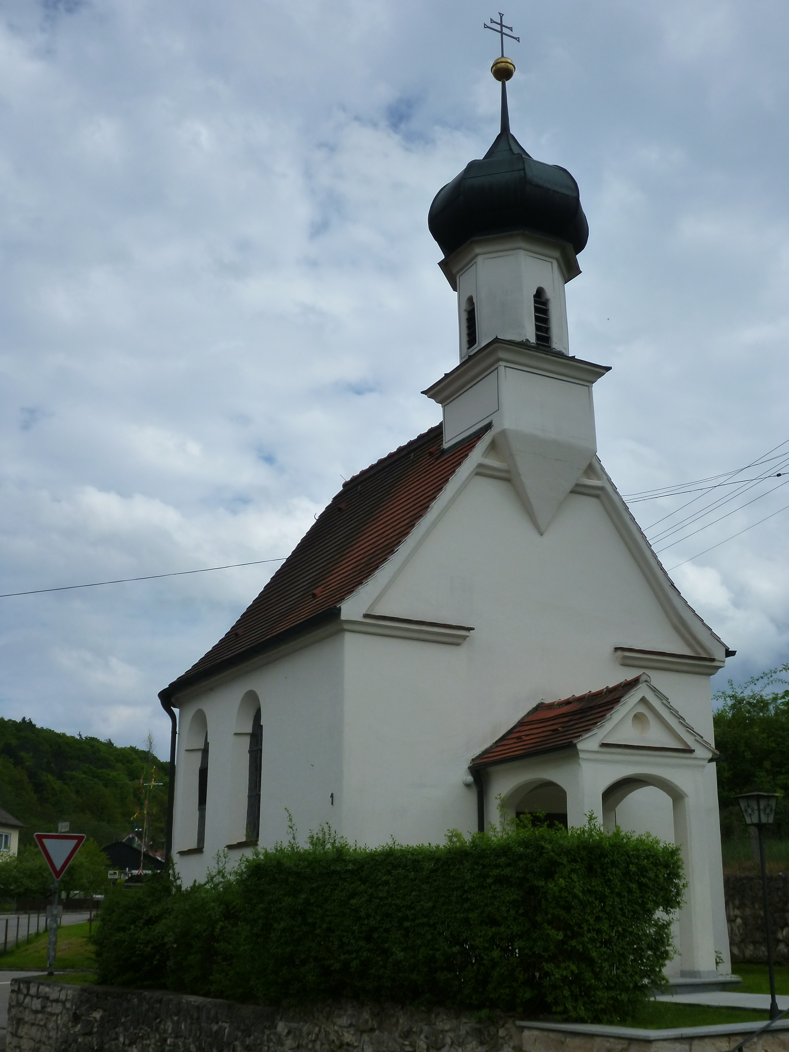 Katholische Kapelle St. Johannes der Täufer in Altenmünster-Eppishofen, Neubau um 1760; mit Ausstattung